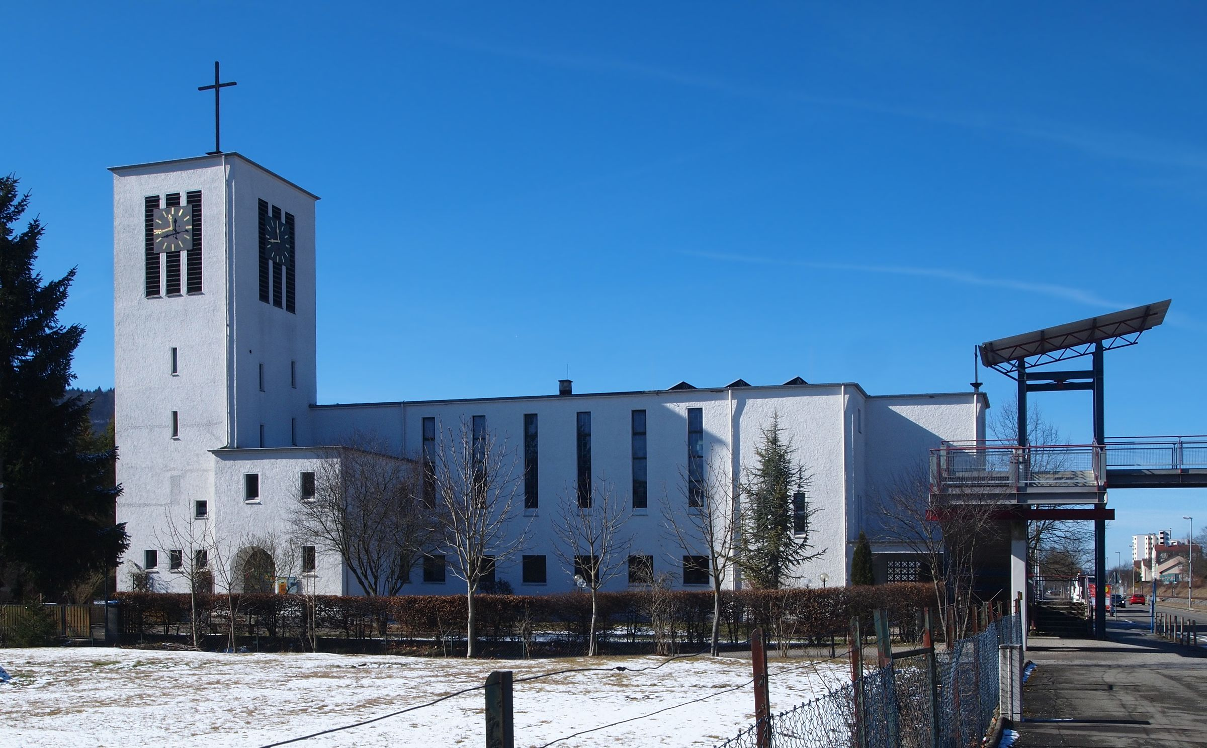 Friedenskirche in Ebingen Rechts der Aufgang zur Fußgängerüberführung über die Zollernbahn.